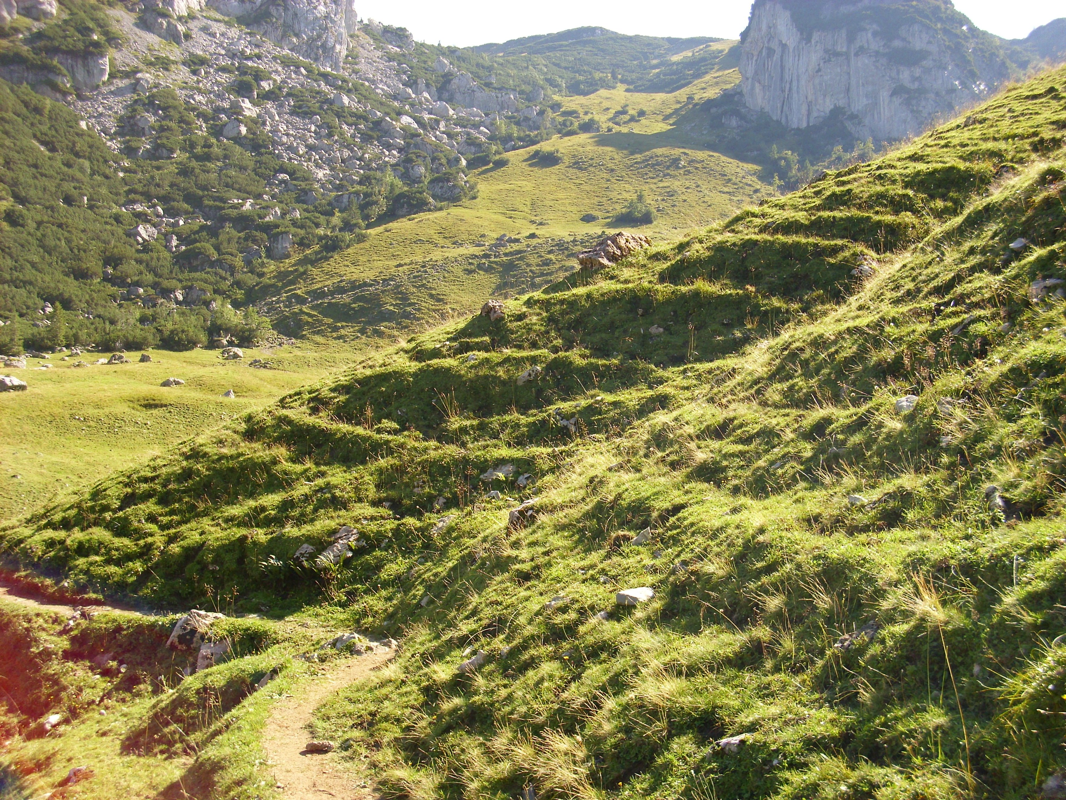 Viehgangeln, Rotwandgruppe, ca. 1.300m.